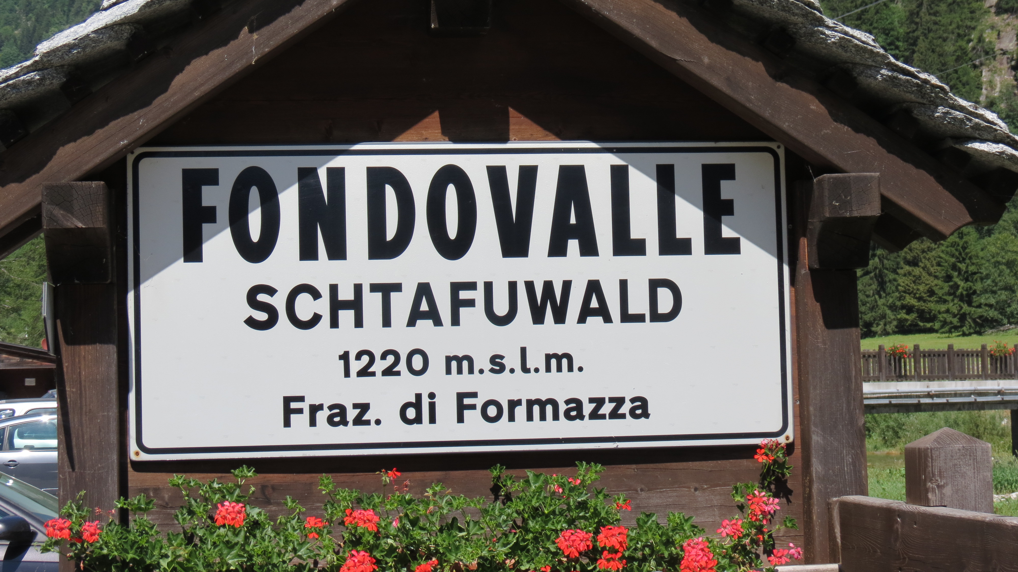 Zweisprachige Ortstafel in Pomatt/Formazza